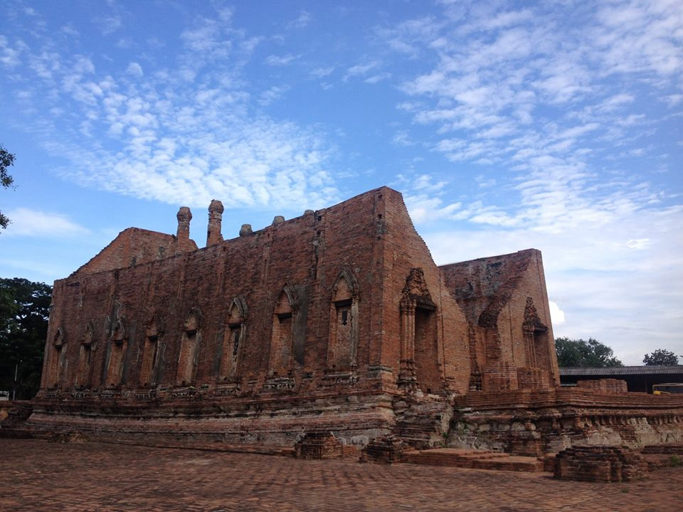 วัดกุฎีดาว จังหวัดพระนครศรีอยุธยา